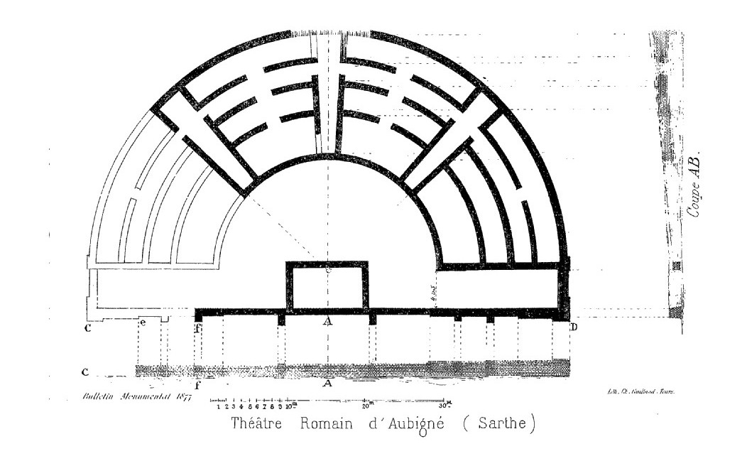 Premier plan du théâtre de Cherré (Aubigné-Racan, Sarthe) d'après les fouilles de la vicomtesse de Quatrebarbes